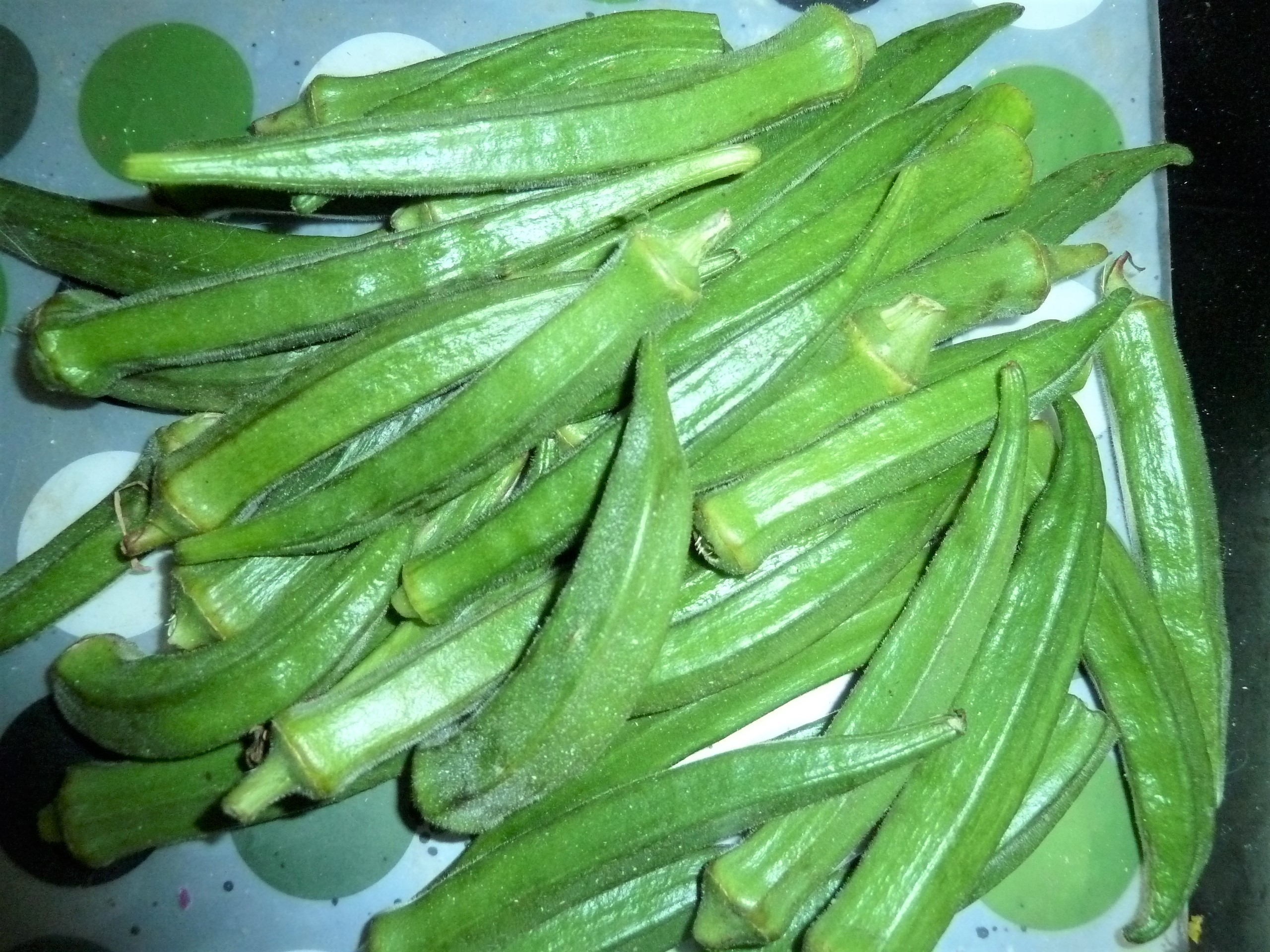 బెండకాయలు